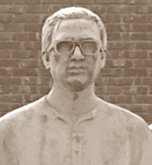 এ এইচ এম কামরুজ্জামান